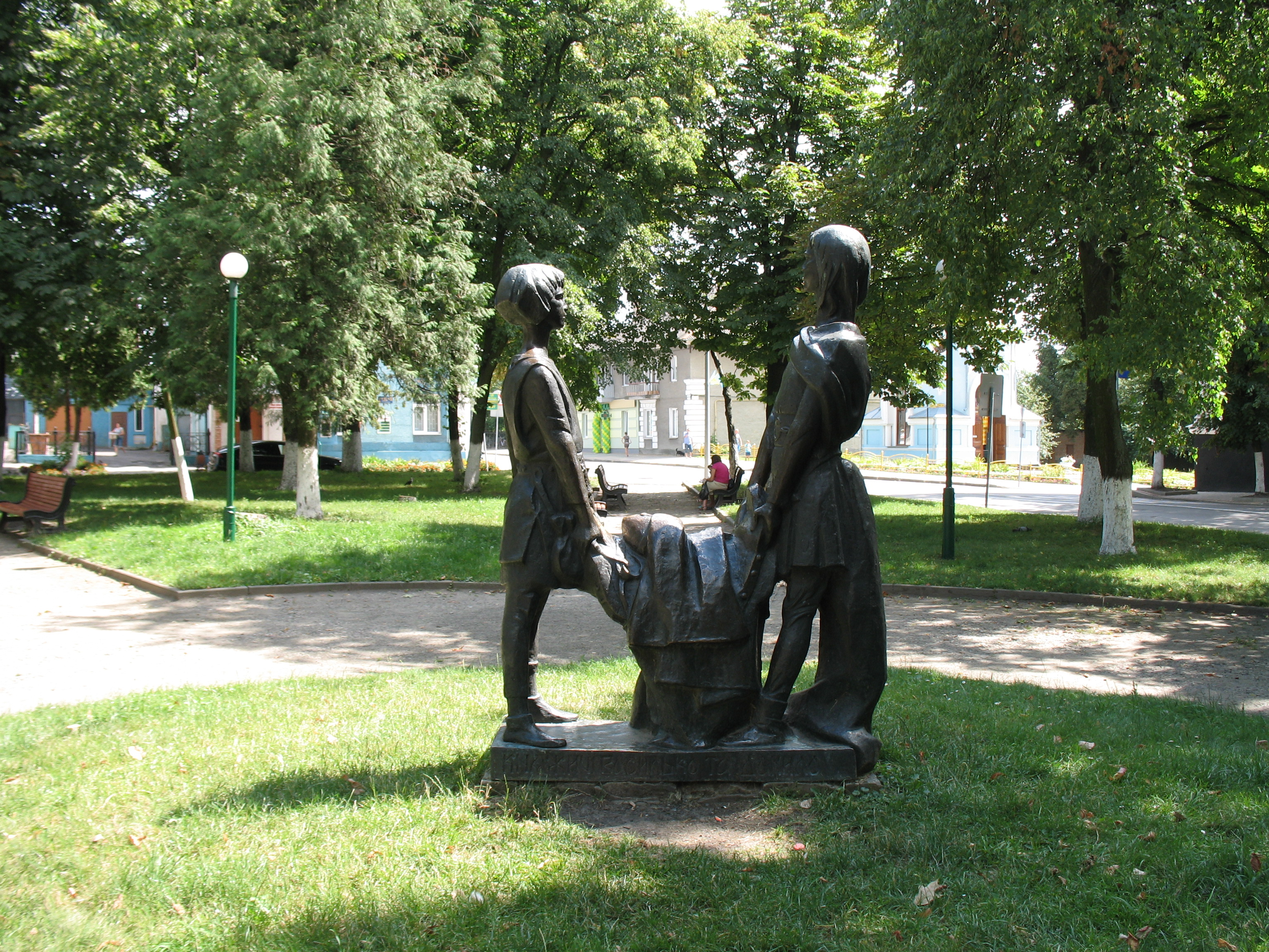 Памʼятник Данилу та Васильку Романовичам